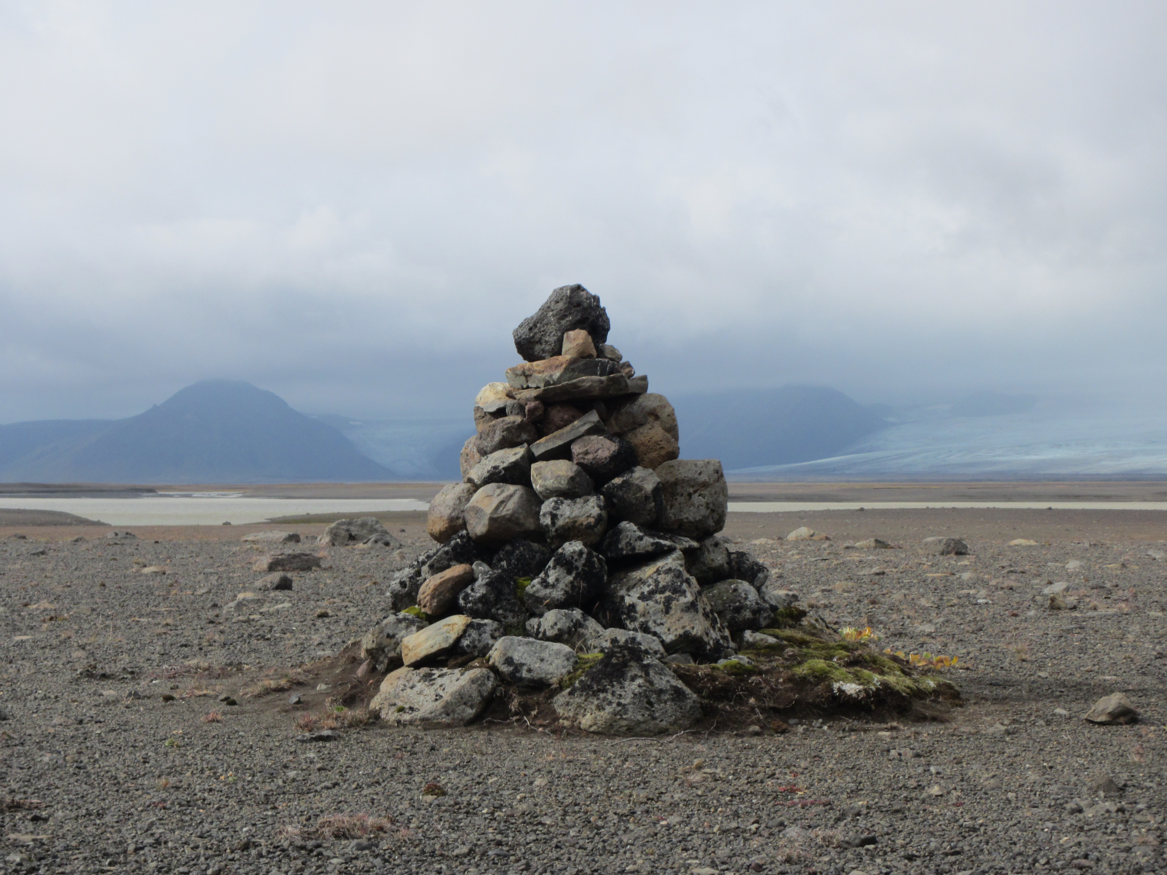 Varðan á Sprengisandi.